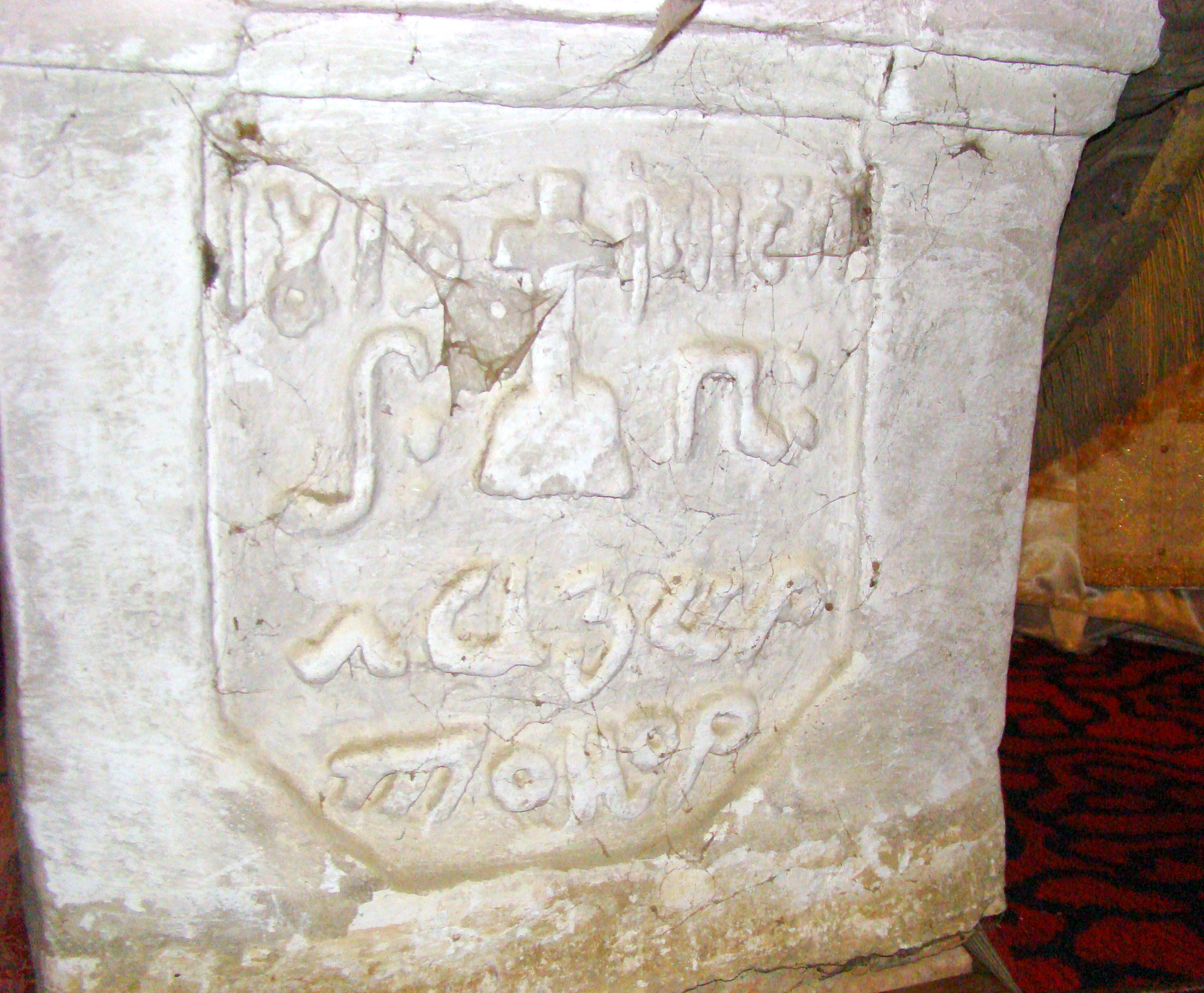 Piciorul mesei altarului. Biserica de lemn din Purcăreț, comuna Letca, județul Sălaj